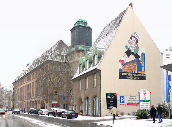 Bahlsen Keksfabrik Hannover; an der Seitenwand des ehemaligen Feuerwehr-Gebäudes die Wiedergabe eines Plakates von Otto Obermeier (um 1912)